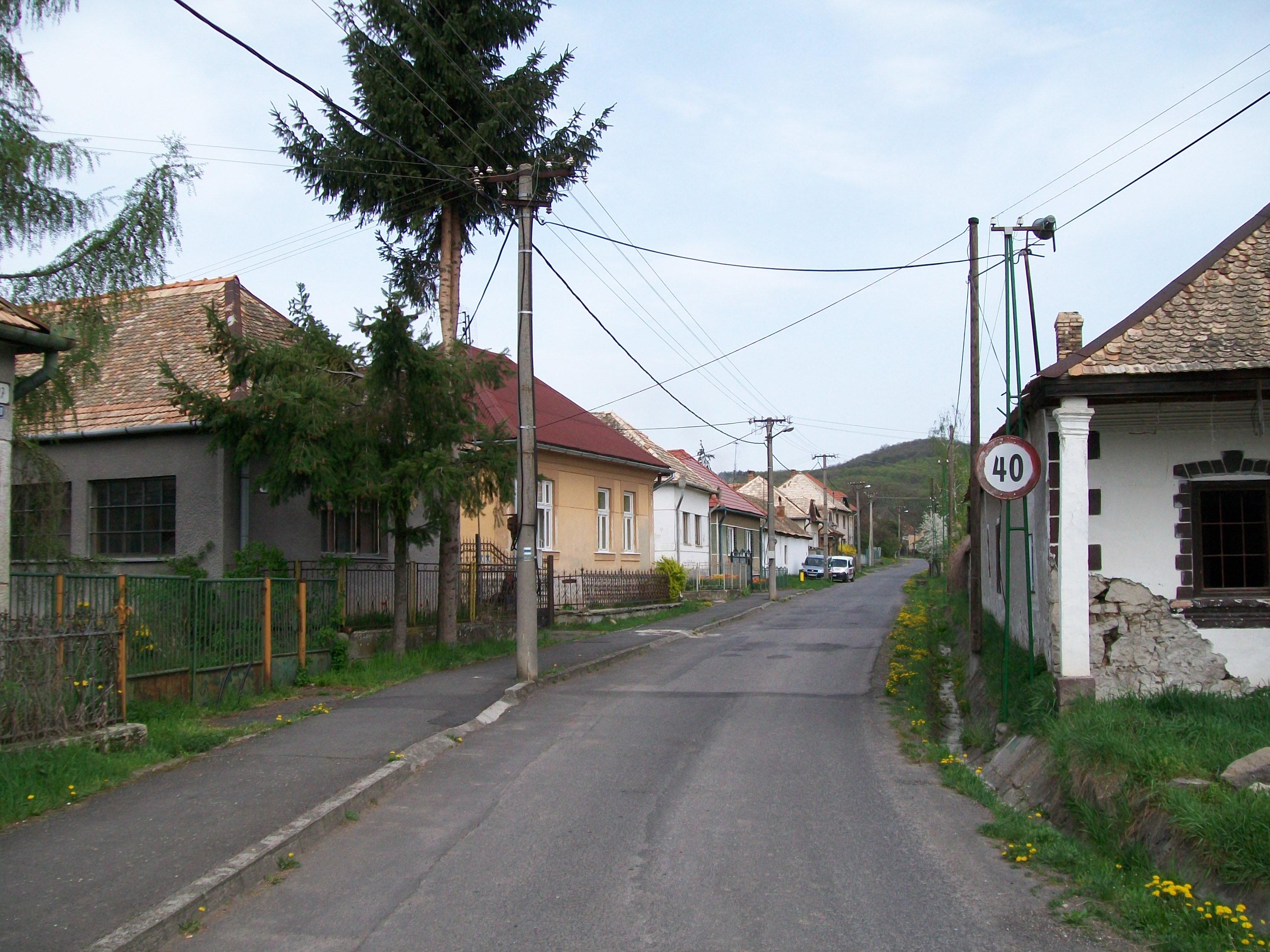 Ulica obce Ľuboreč